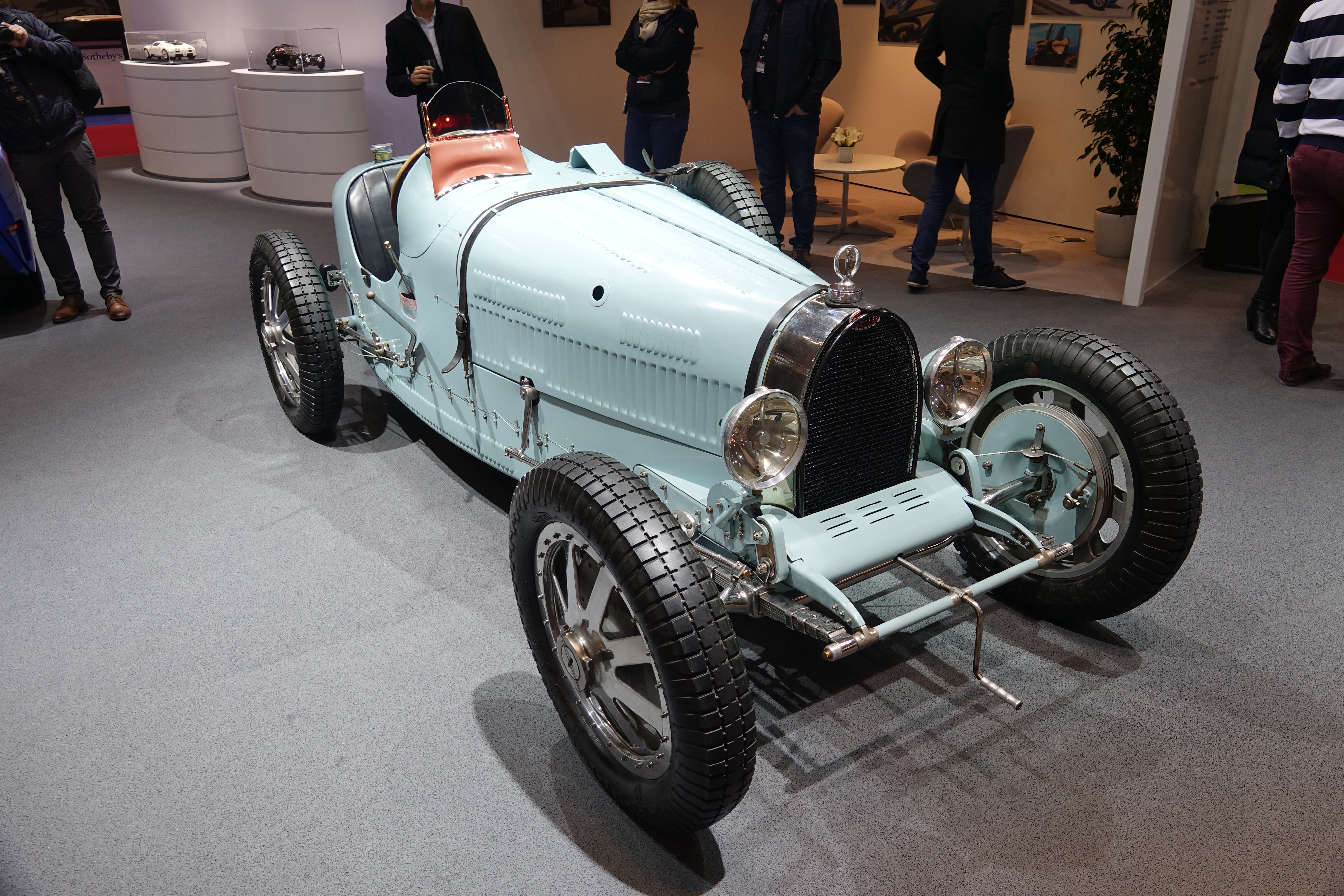 Bugatti Type 35 au salon Rétromobile 2020